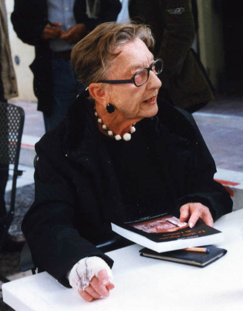 Honor Frost e Maurizio Vento